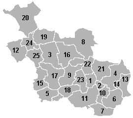 Kaart van Overijssel met alle gemeenten genummerd Categorie:Afbeelding Overijssel